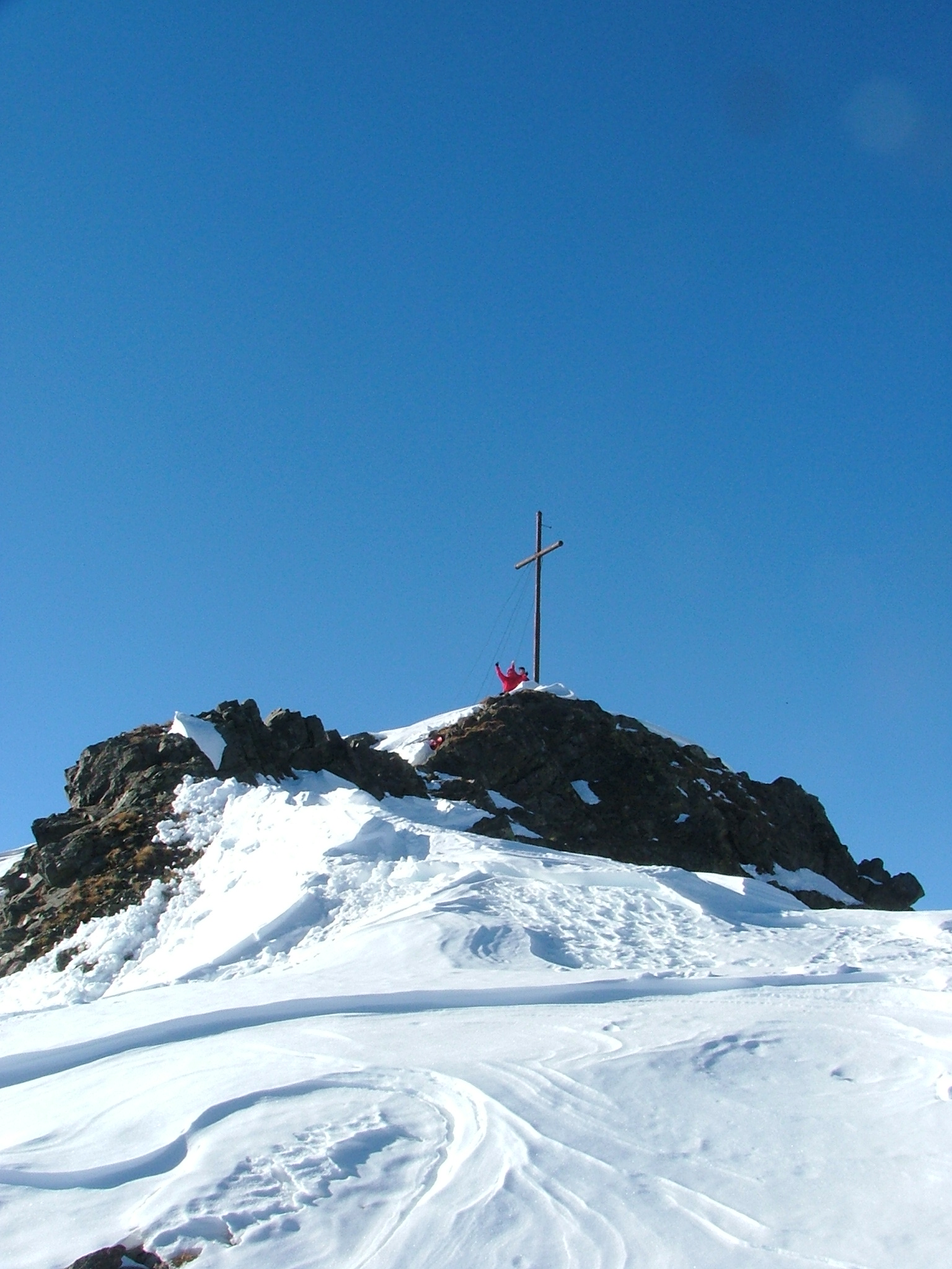 Cima Monte Quaternà,Padola, Belluno, Veneto, Dolomites, Italy